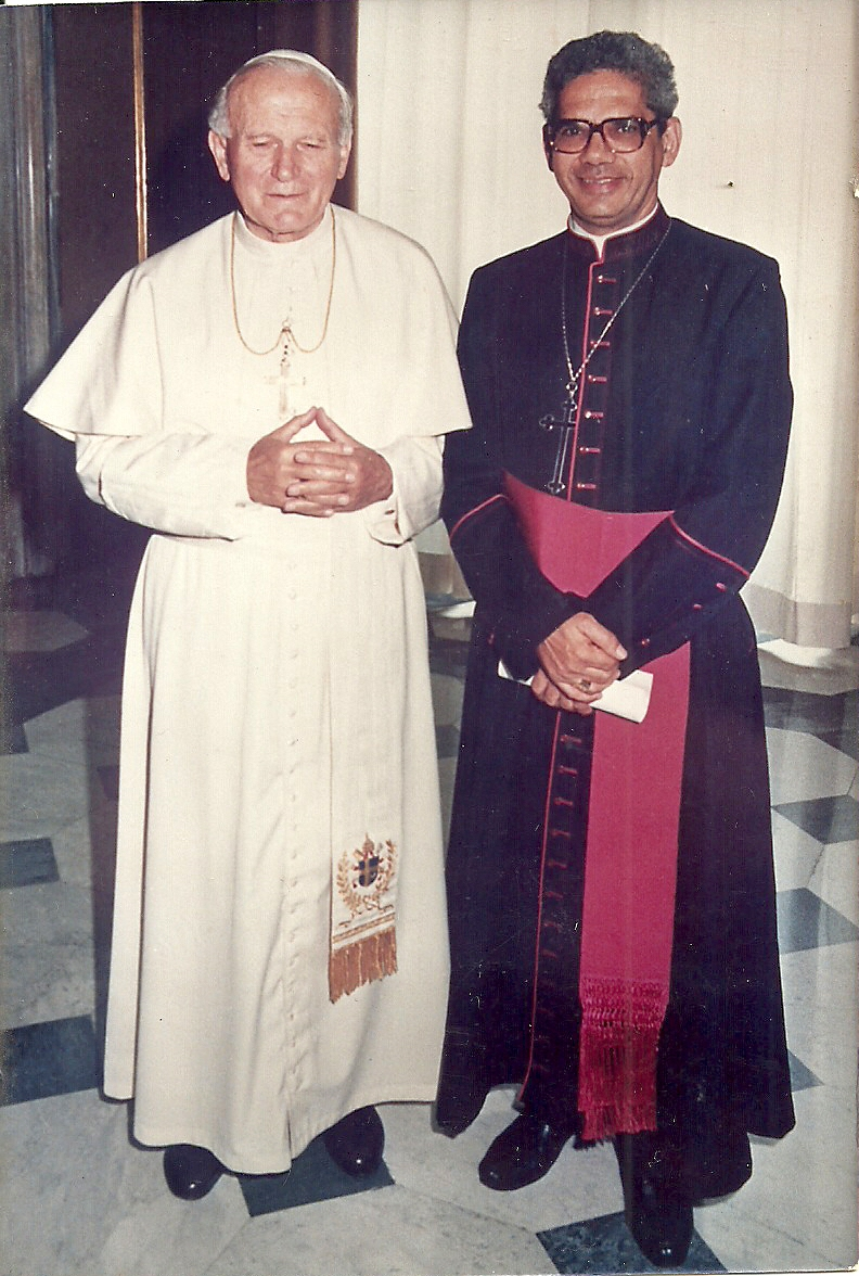 Bispo Dom Felippe e Papa João Paulo II